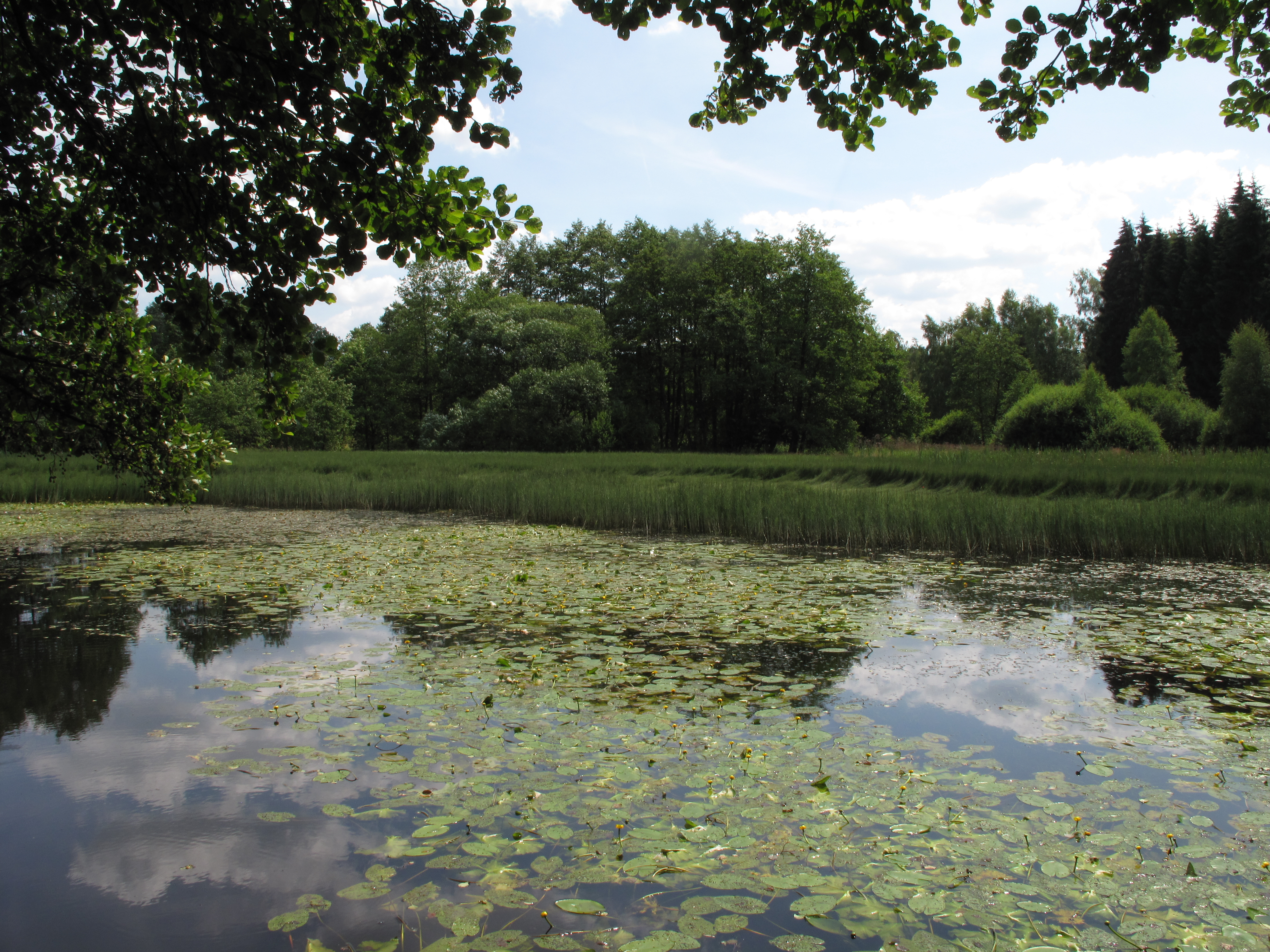 Přírodní rezervace Rybník Březina. Okres Jihlava, Česká republika.